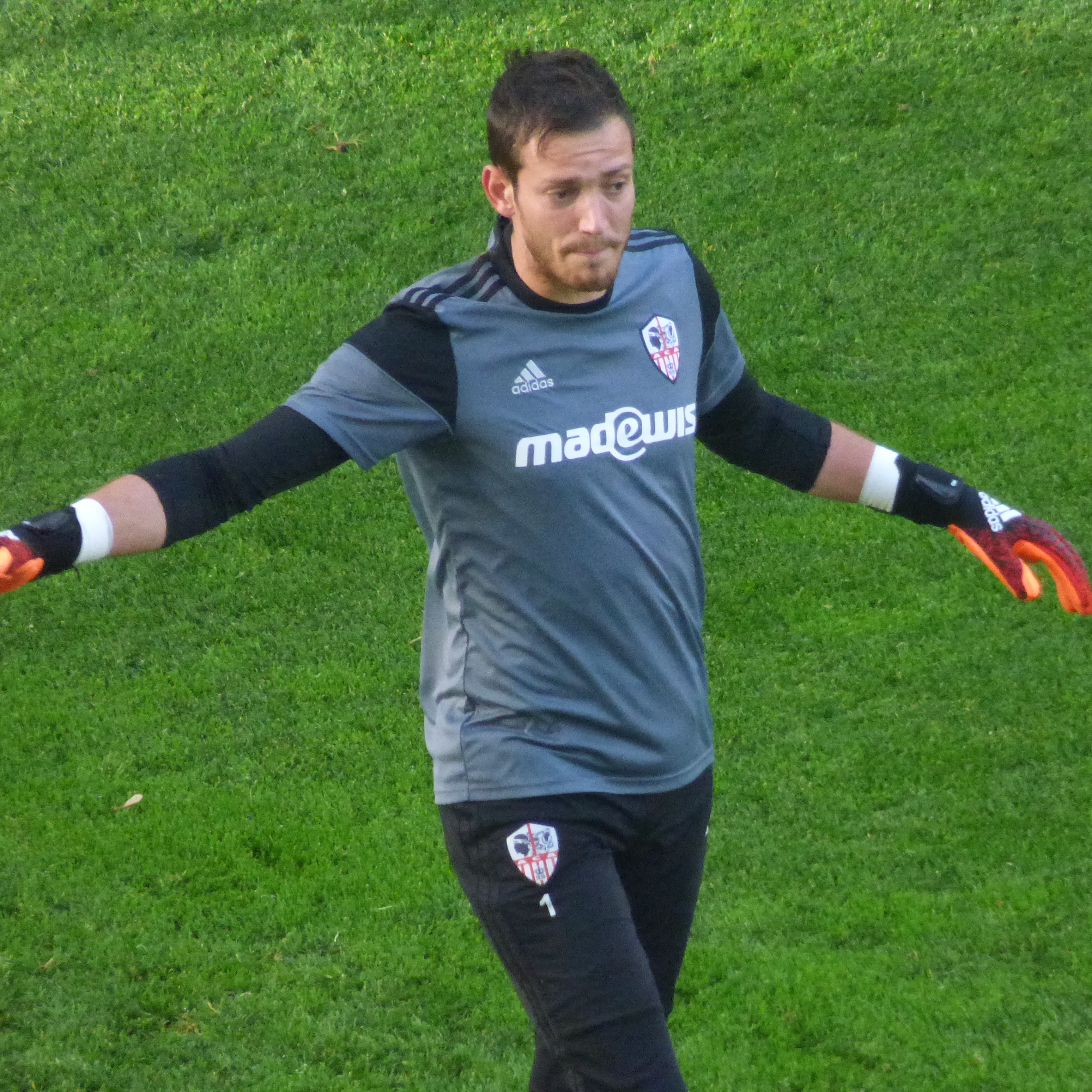 Benjamin Leroy avant le match RC Lens - AC Ajaccio, comptant pour la dix-neuvième journée du championnat de France de Ligue 2 2018-2019, le 22 décembre 2018, au Stade Bollaert-Delelis de Lens.